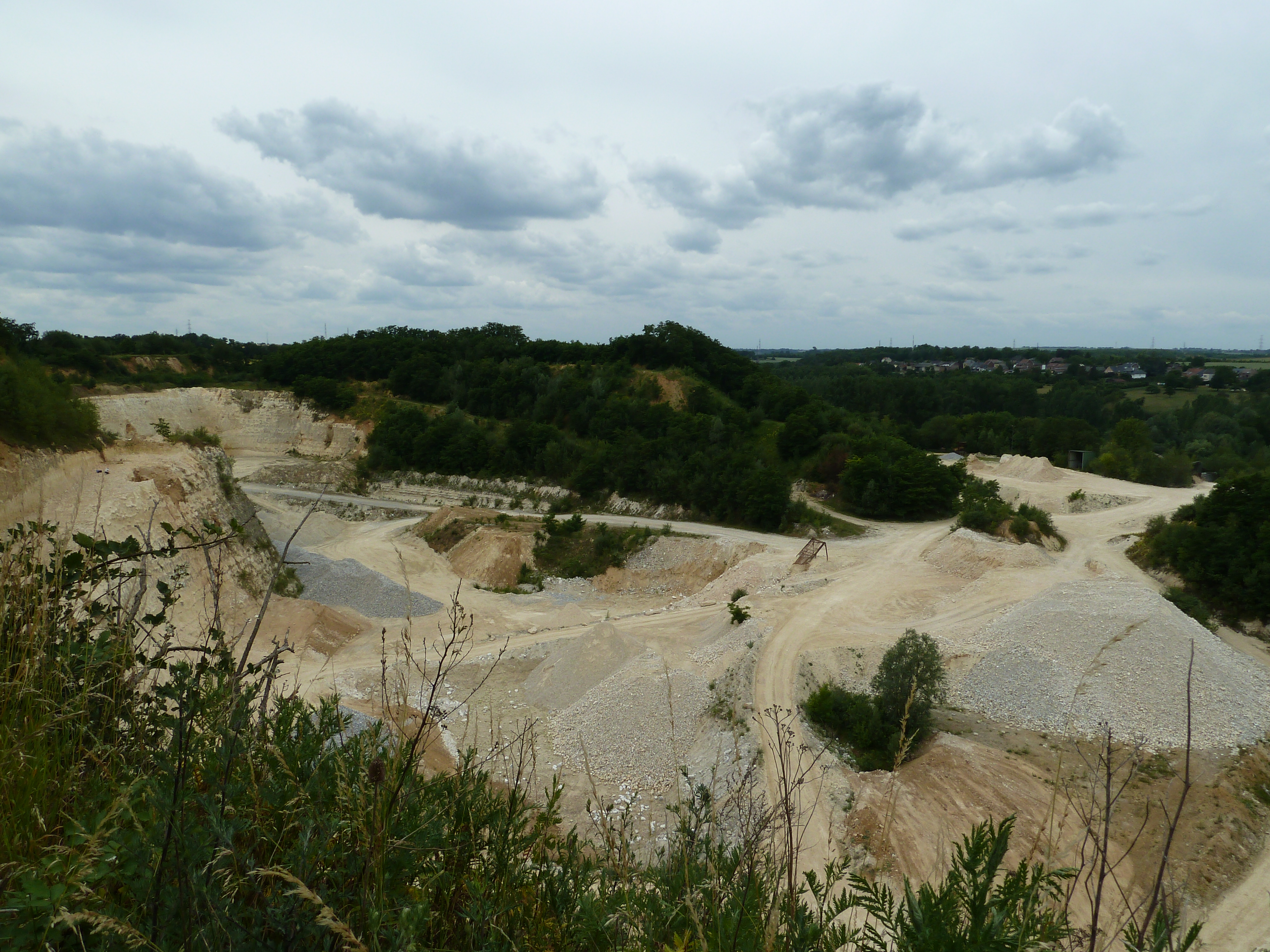 carrière Marnebel, Bassenge, Belgique